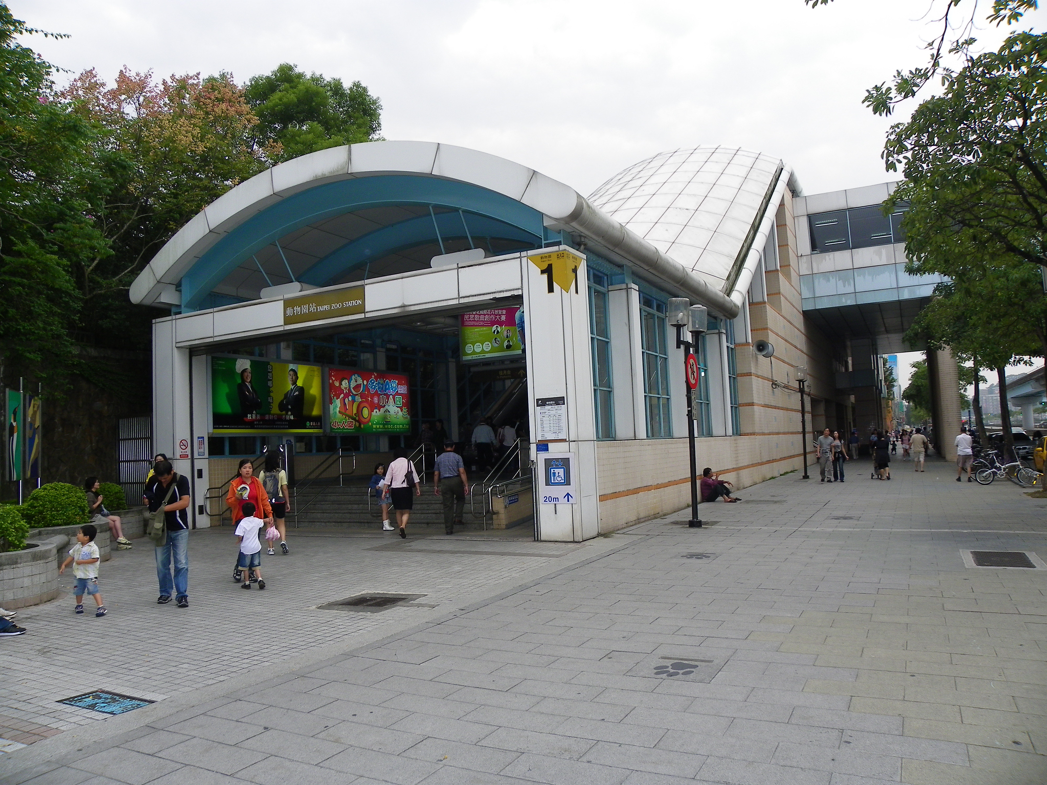 台北捷運文山線動物園駅の1号出口。